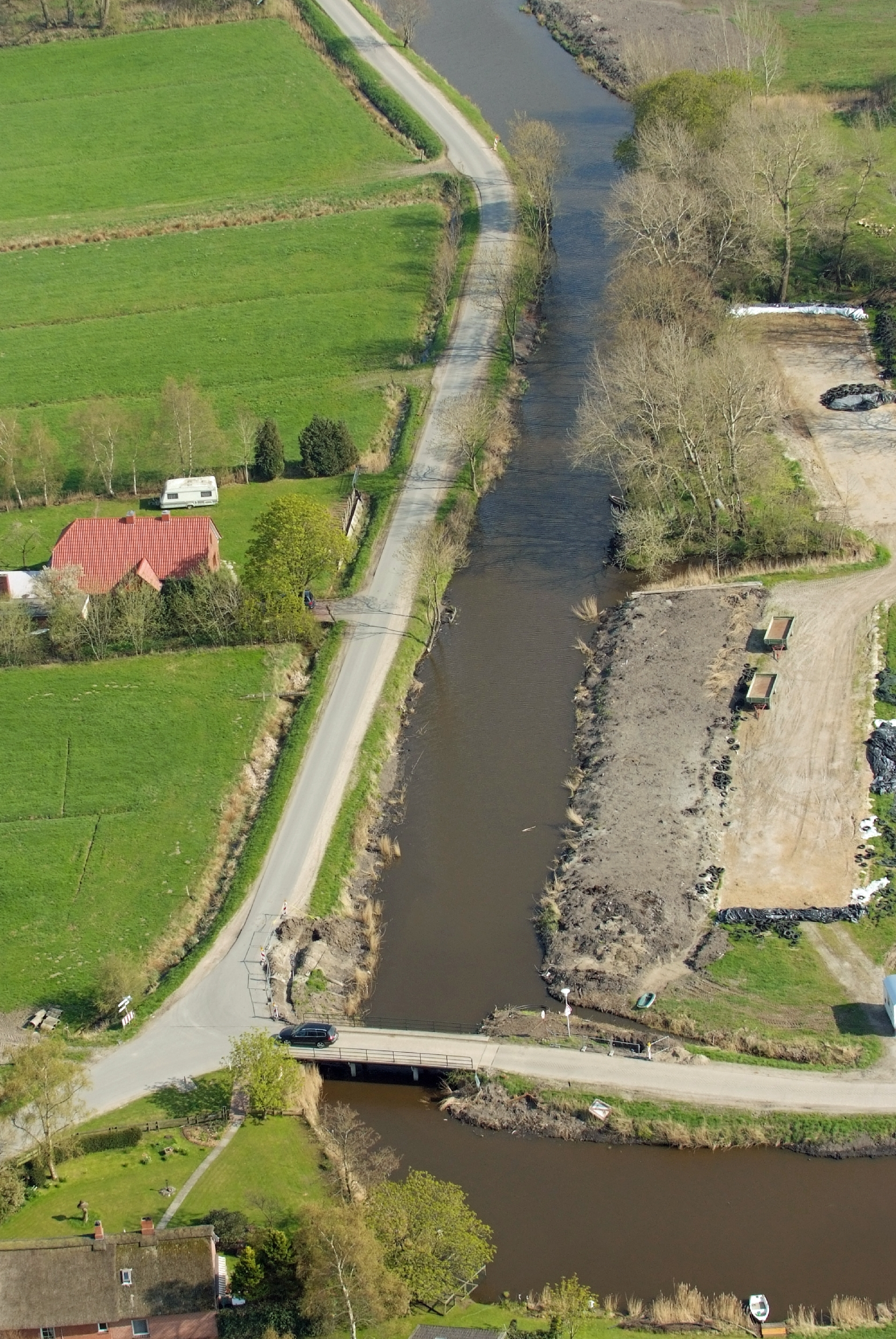 Treckfahrtstief in Emden-Marienwehr